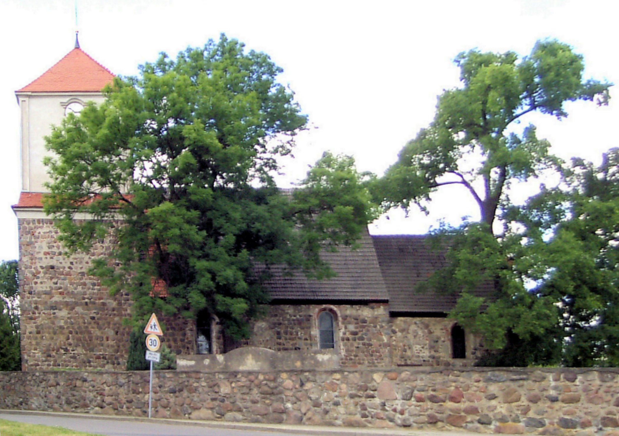 Evangelische Kirche in Felchow